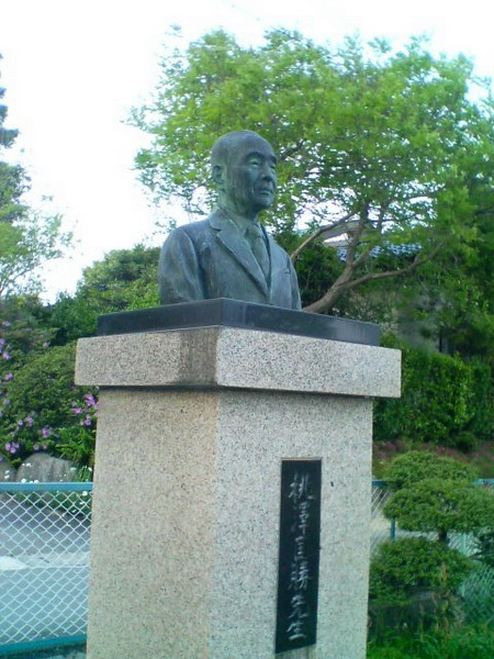 桃澤匡勝の胸像